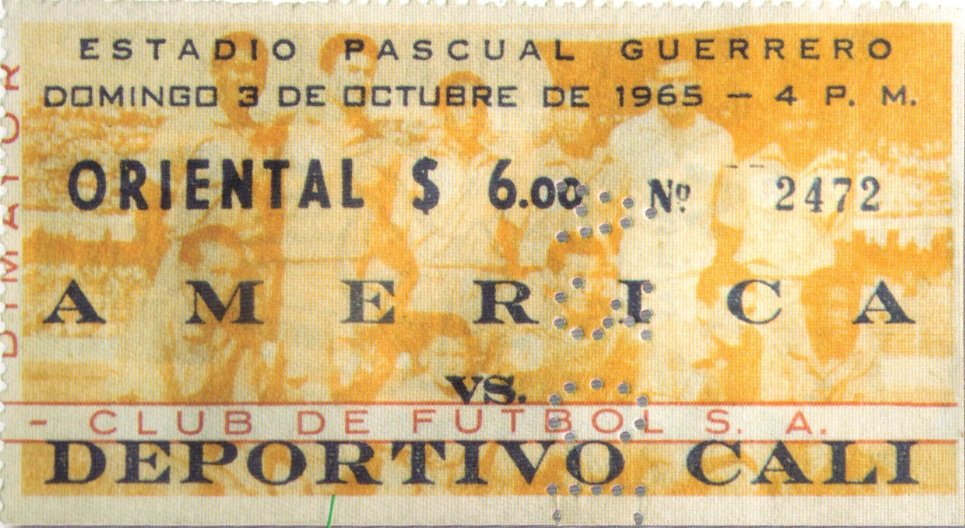 Boleta para el partido entre Deportivo Cali y el América de Cali